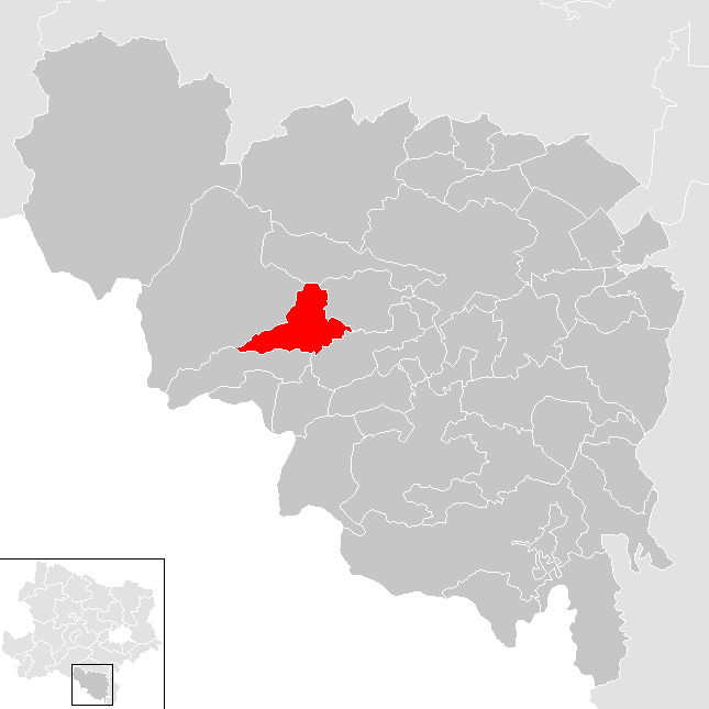 Bezirk Neunkirchen